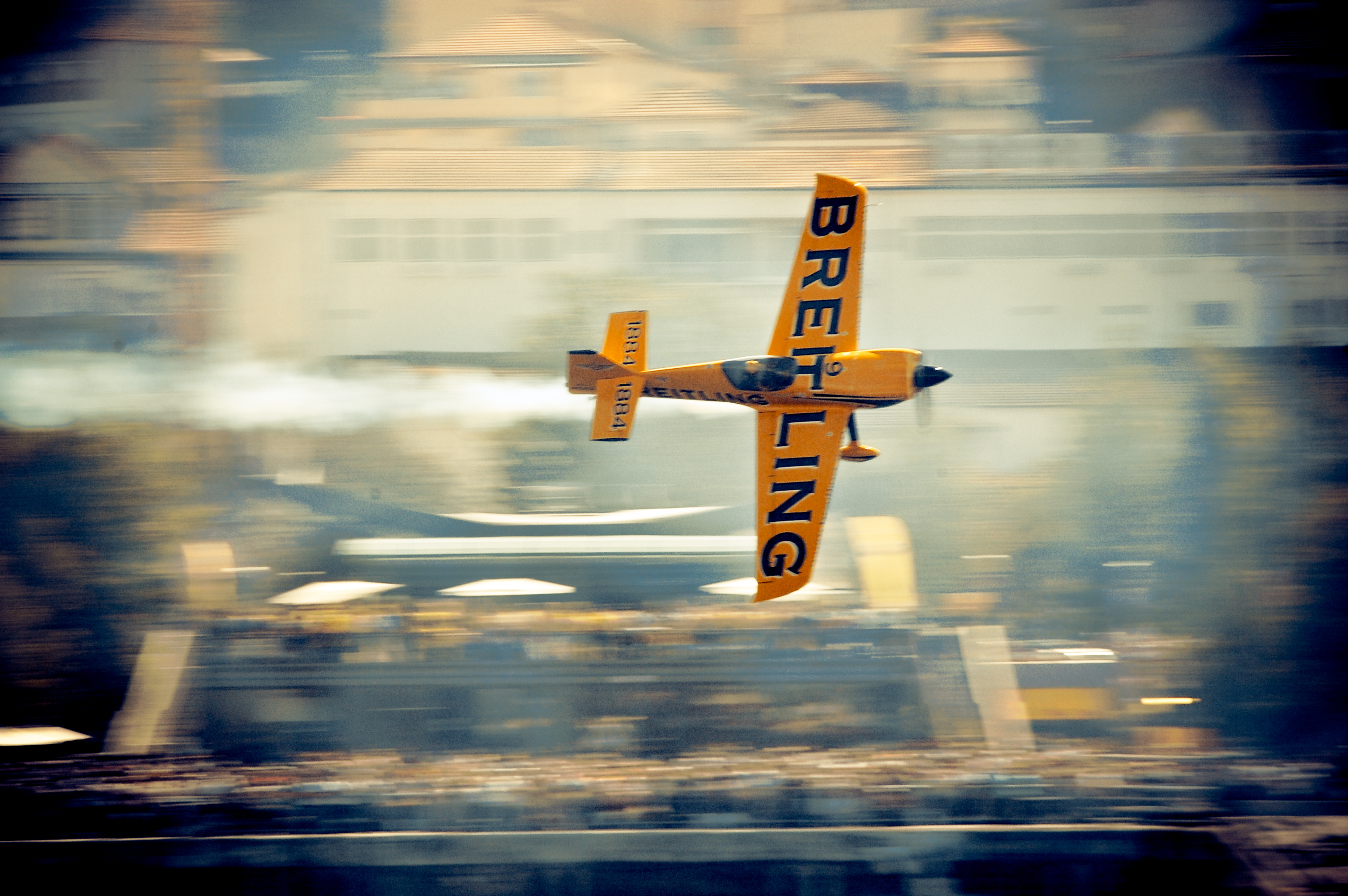 Oporto, Gaia, Portugal.